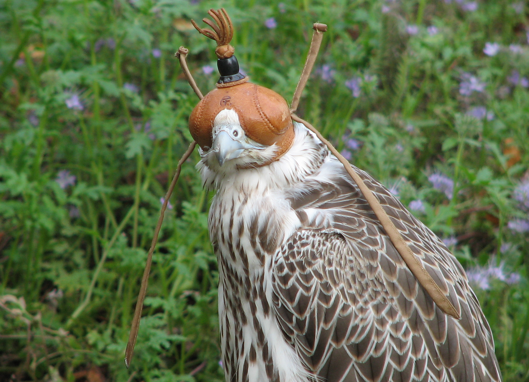 Jagdfalke mit Kappe (wahrscheinlich in Deutschland)